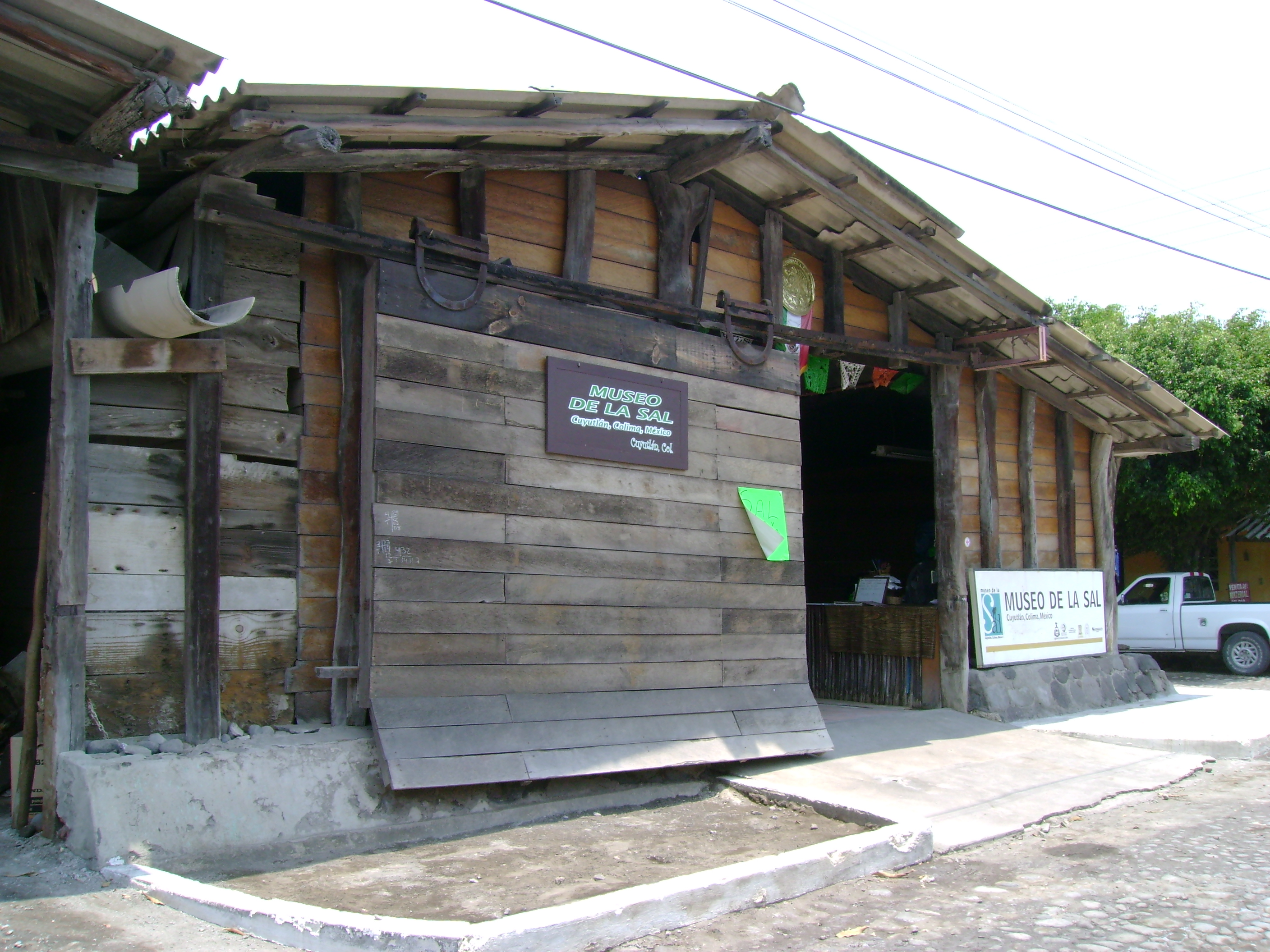 Museo de la Sal en Cuyutlan, Colima.